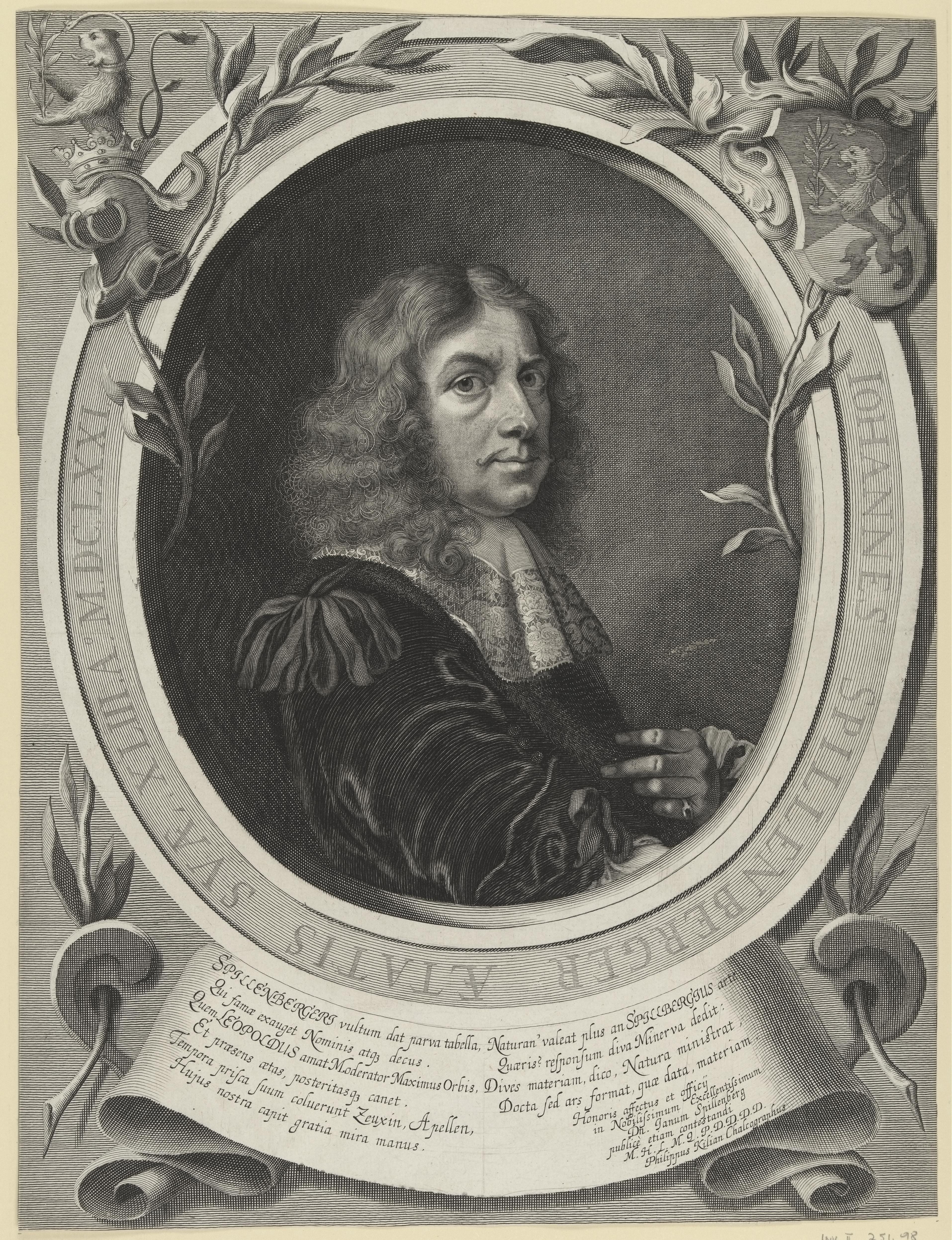 Bildnis des Iohannes Spillenberger Coburg, Kunstsammlungen der Veste Coburg, Inv.-Nr. II,251,98